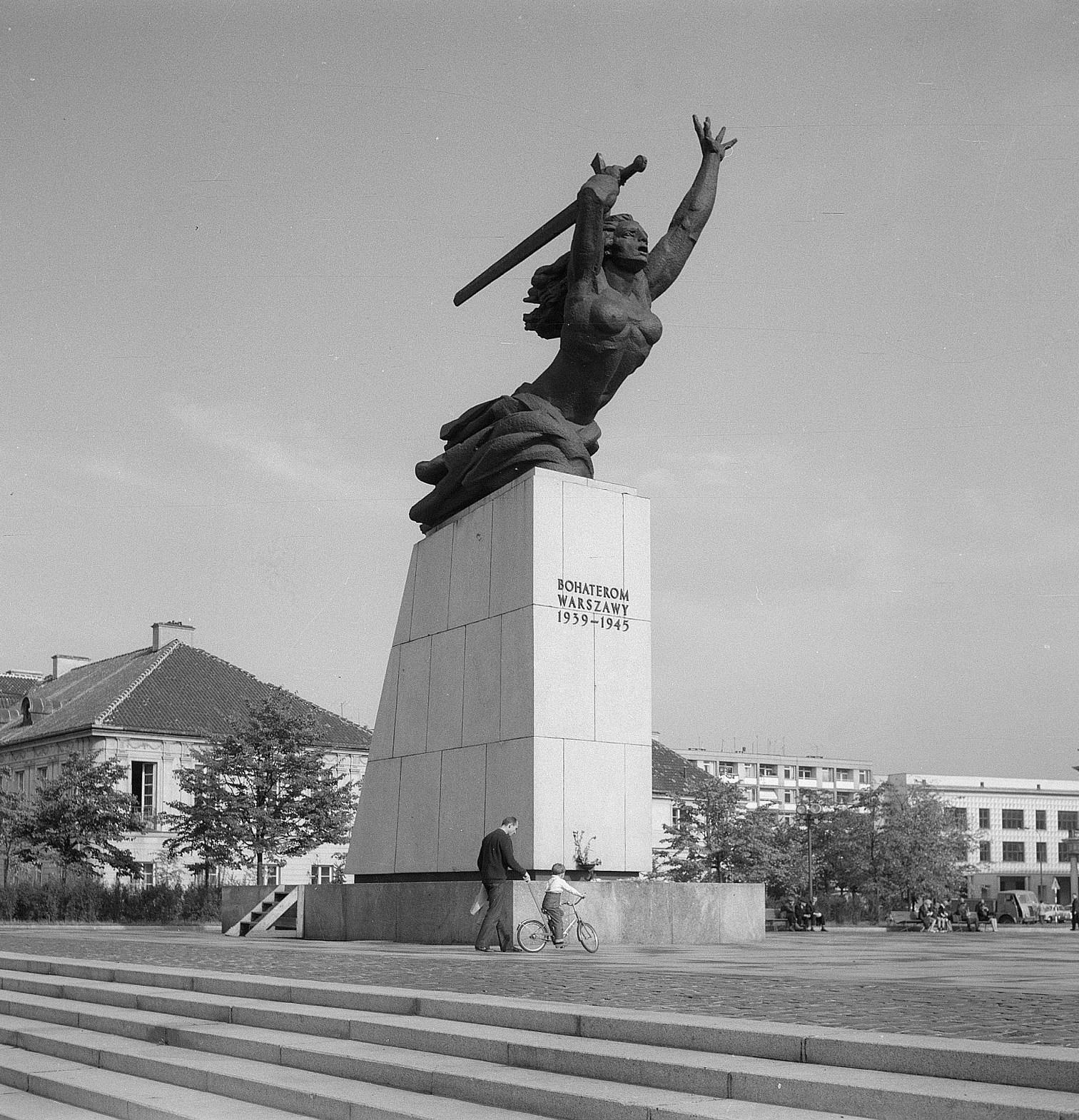 Original image description from the Deutsche Fotothek Warschauer Nike: "Den Helden Warschaus 1939-1945"